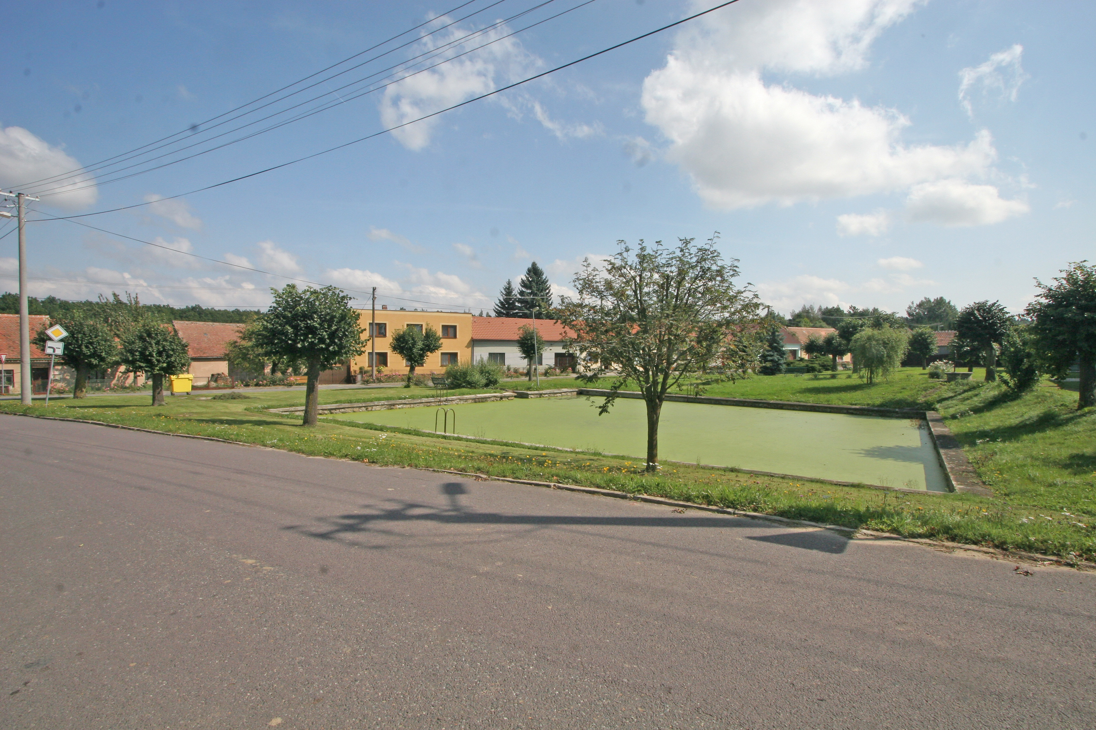 Zálesí náves